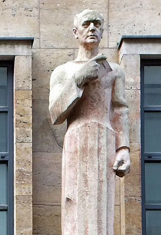 Alfred Liebig, dargestellt als Fassadenfigur am Petershof in Leipzig